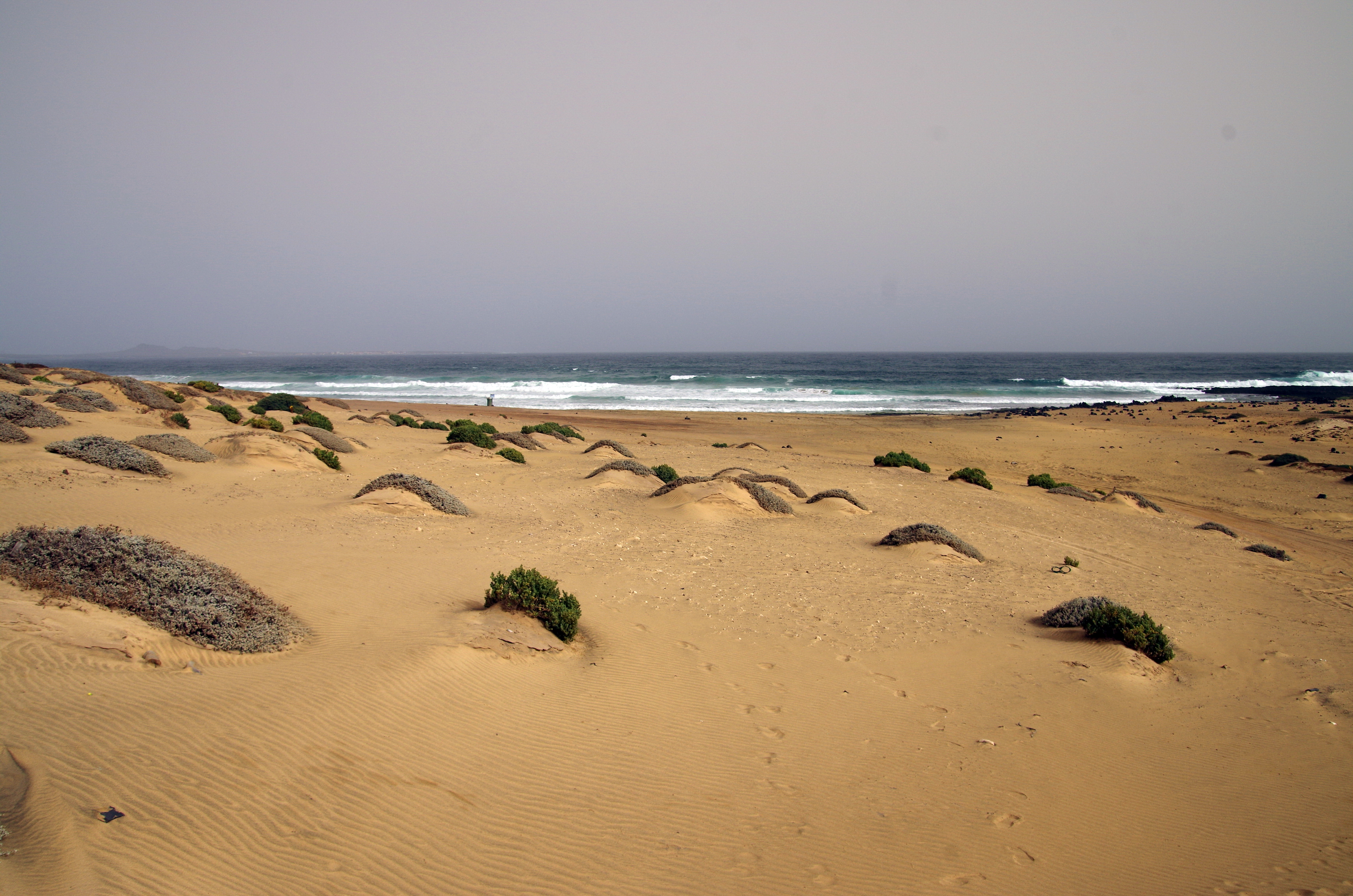 Baía das Gatas